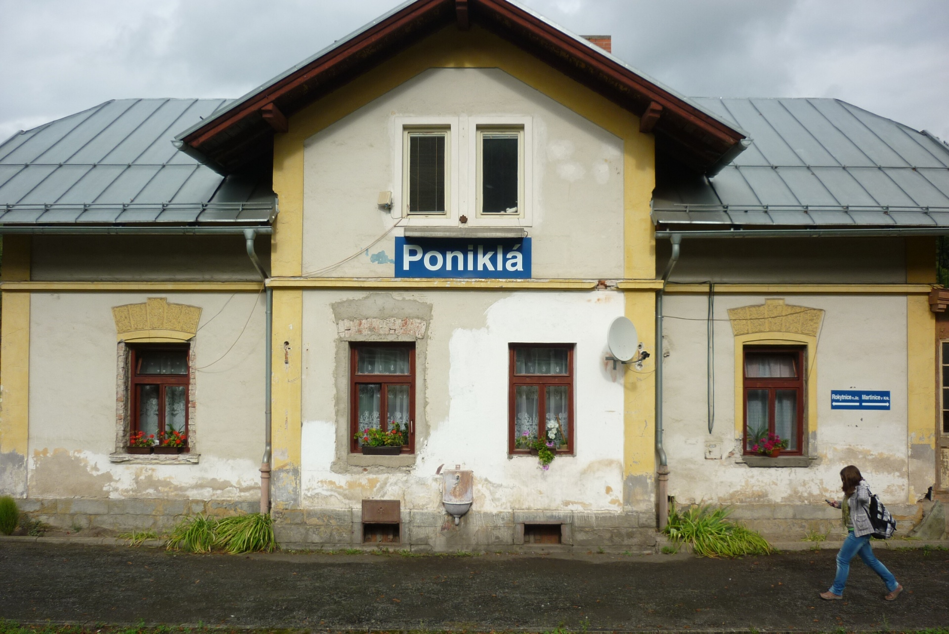 Poniklá - nádraží ČD